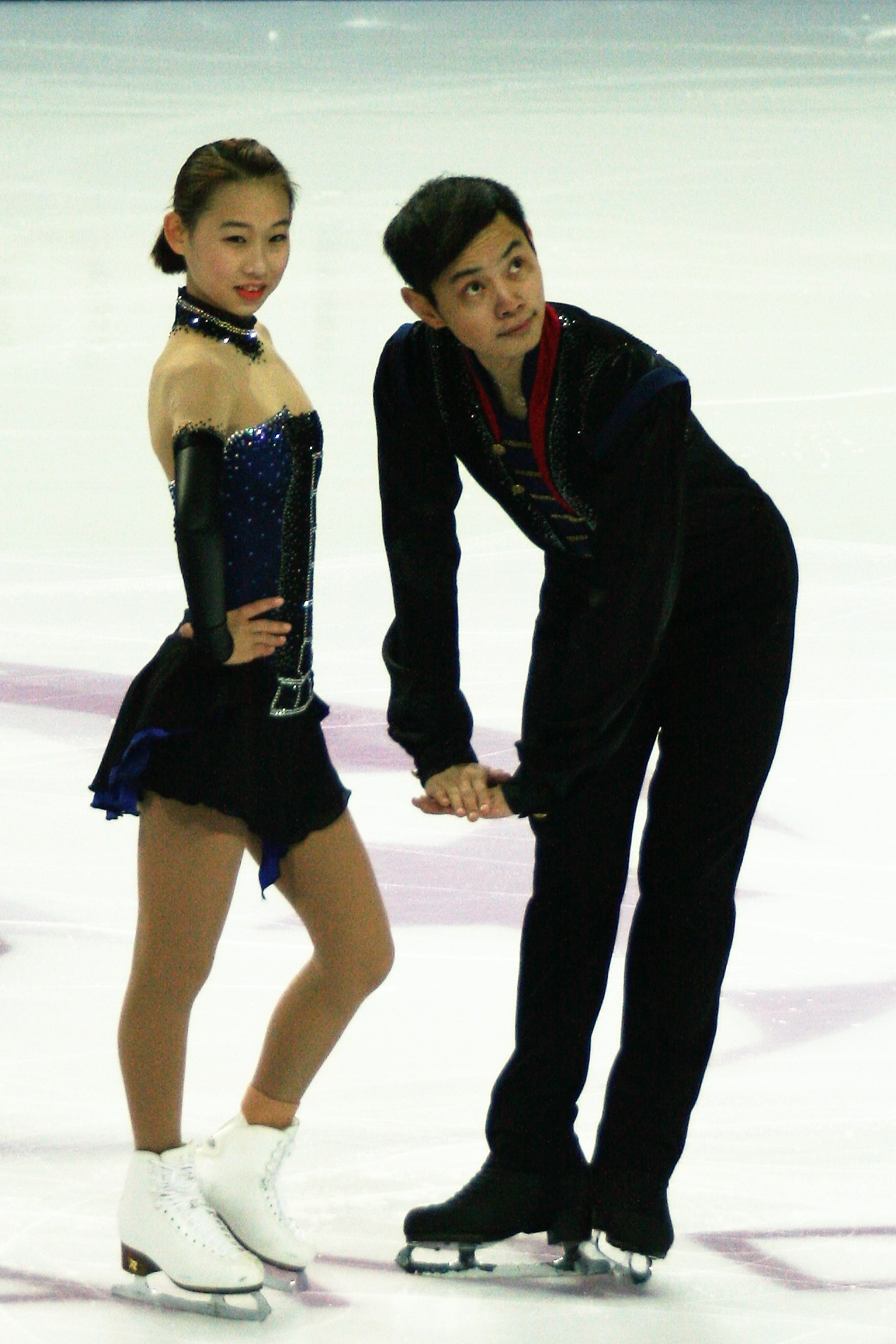 Пэн Чэн / Цзинь Ян (КНР) на финале Гран-при по фигурному катанию 2016-2017